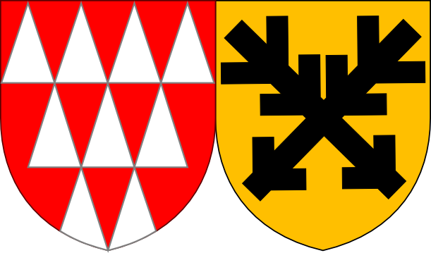 Heraldický znak 19. biskupa olomouckého